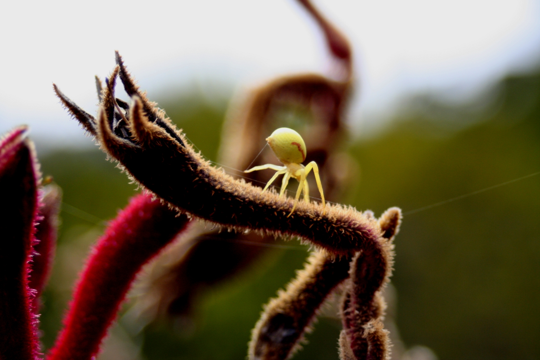 Crab Spider Misumena vatia is making her web on a kangaroo paw plant